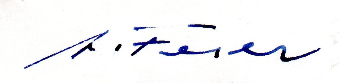 Unterschrift des Malers Albert Feser